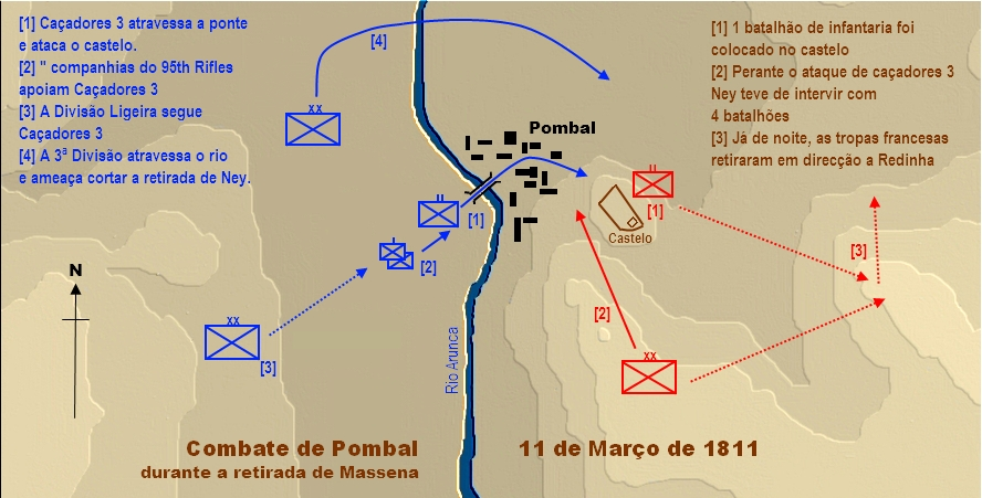 Mapa com esquema do Combate de Pombal em 11 de Março de 1811